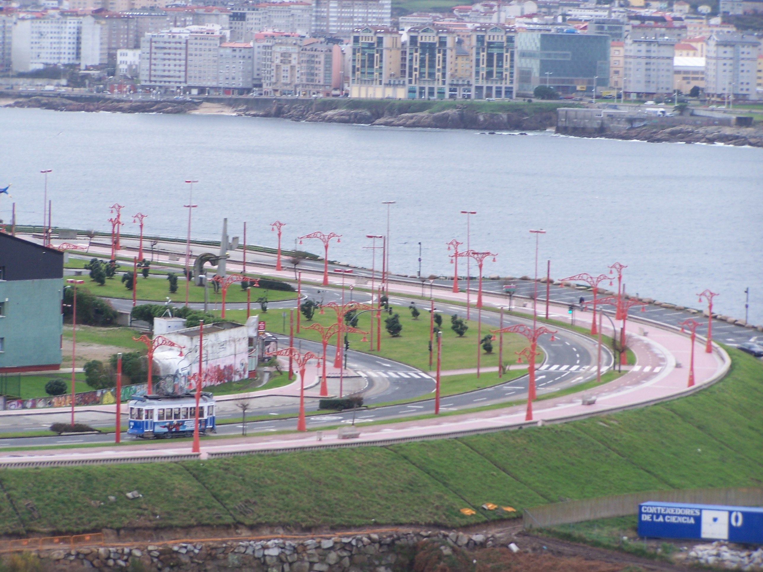 Tranvia A Coruña